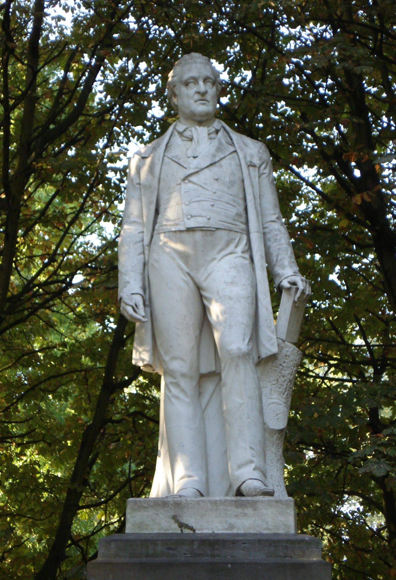 Rotterdam, Standbeeld van Tollens, Park Euromast. Rijksmonument.